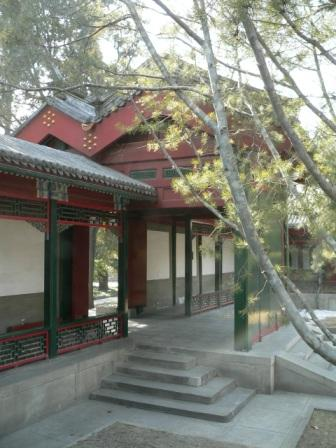 垂花门内部拍摄